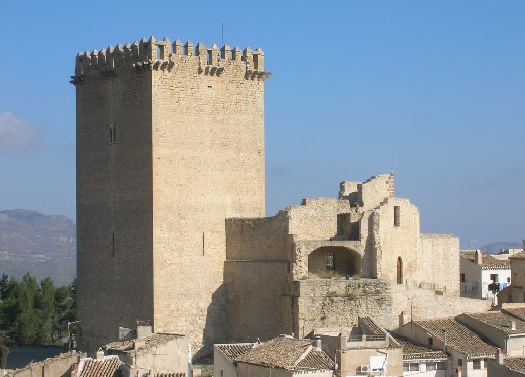 Moratalla, Murcia, España, castillo-fortaleza medieval. Moratalla, Murcia, Spain, medieval castle. Own picture, given to PD.